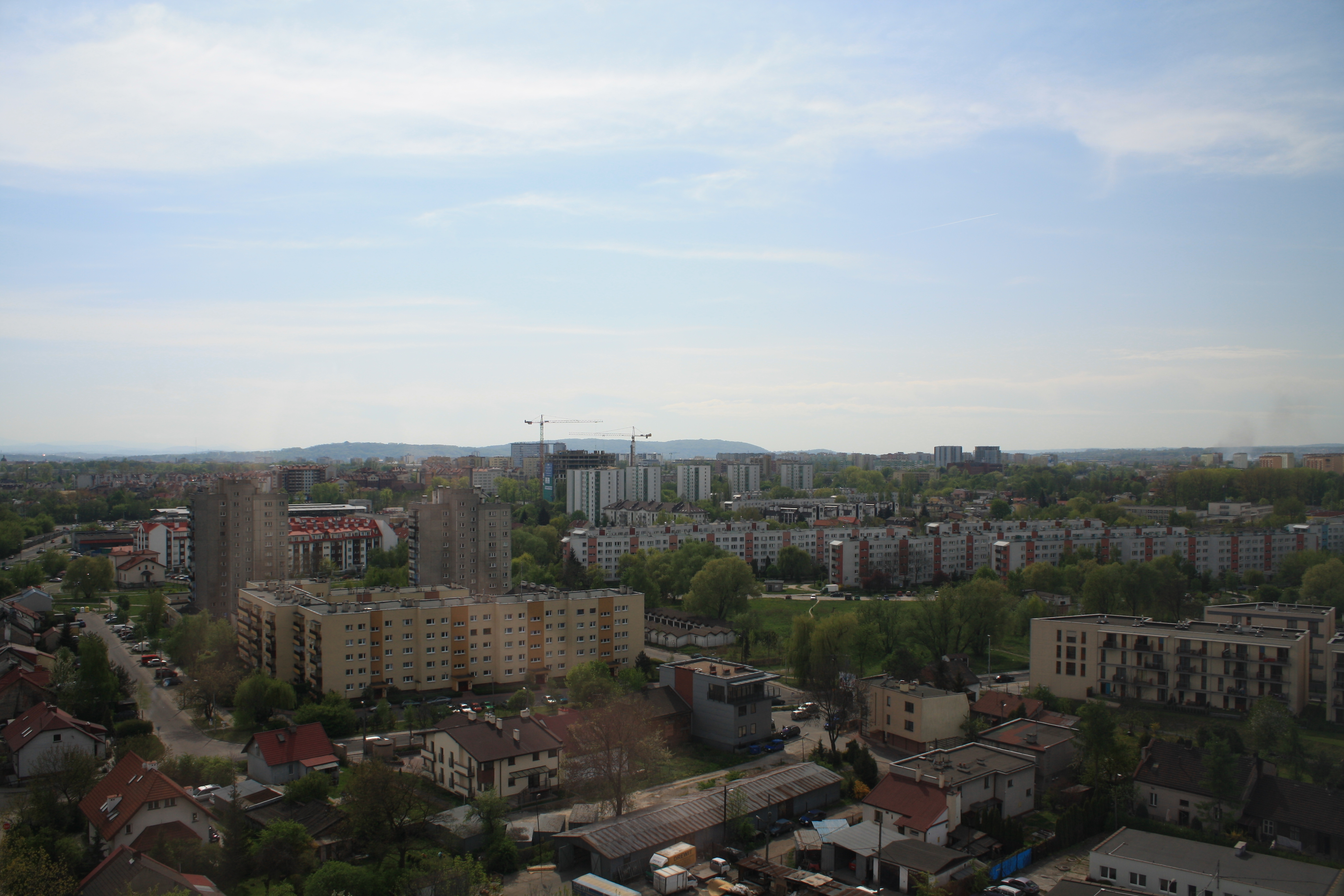 widok na w kierunku zachodnim na dzielnicę Prądnik Biały (Wschód)